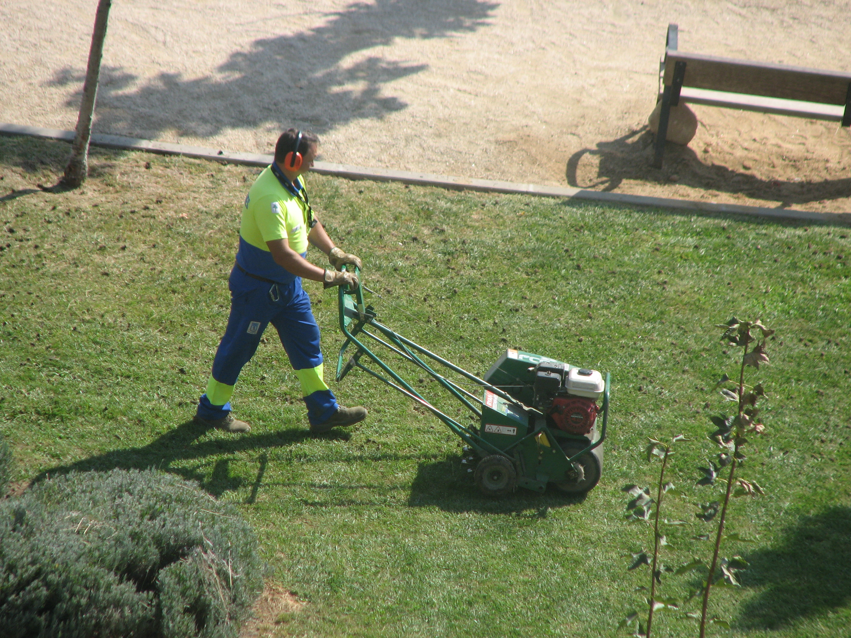 Aireadora con motor térmico, Ryan Lawnaire IV